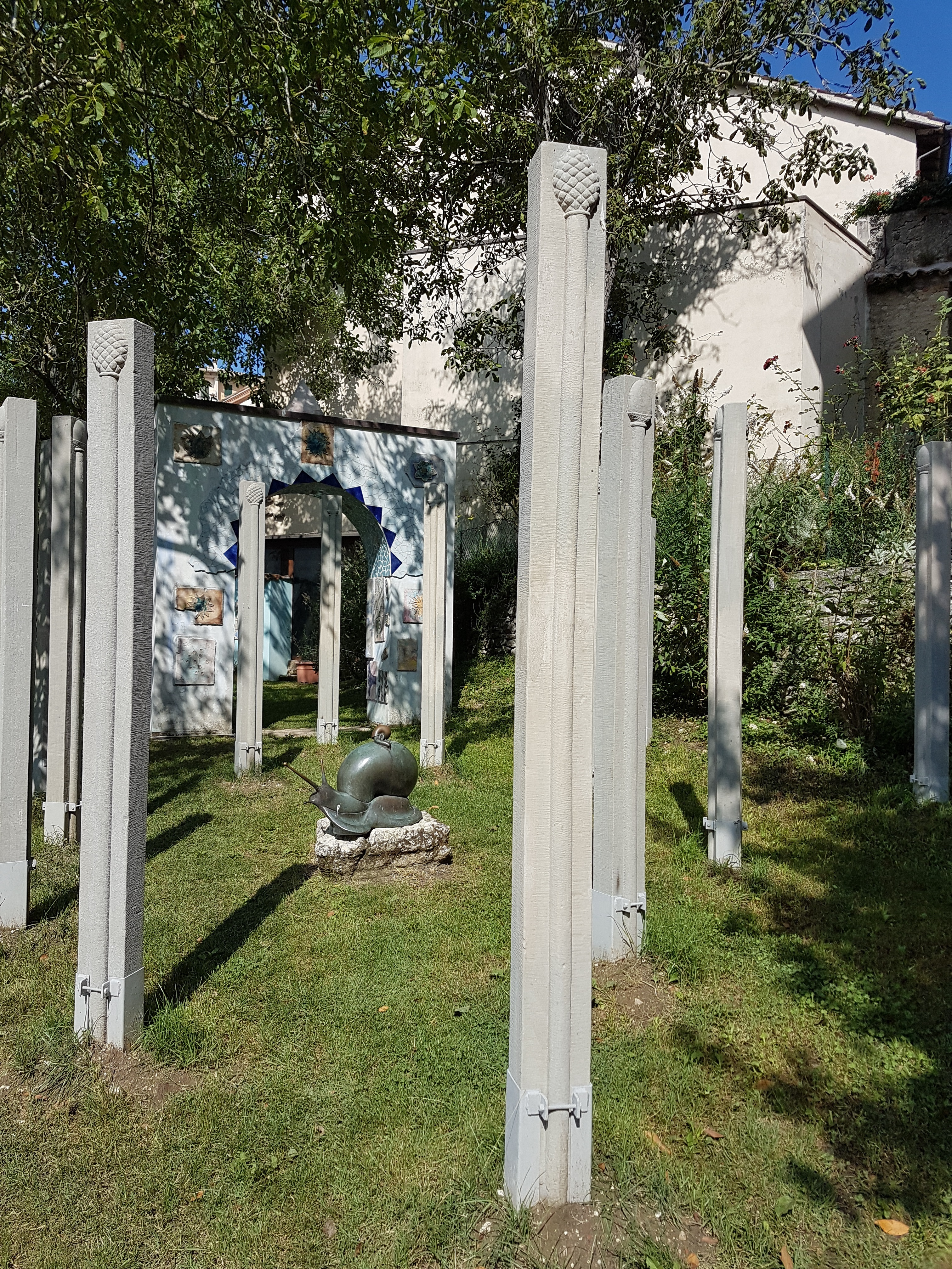 Decorazioni dell'"Orto dei frutti dimenticati" di Pennabilli (RN)